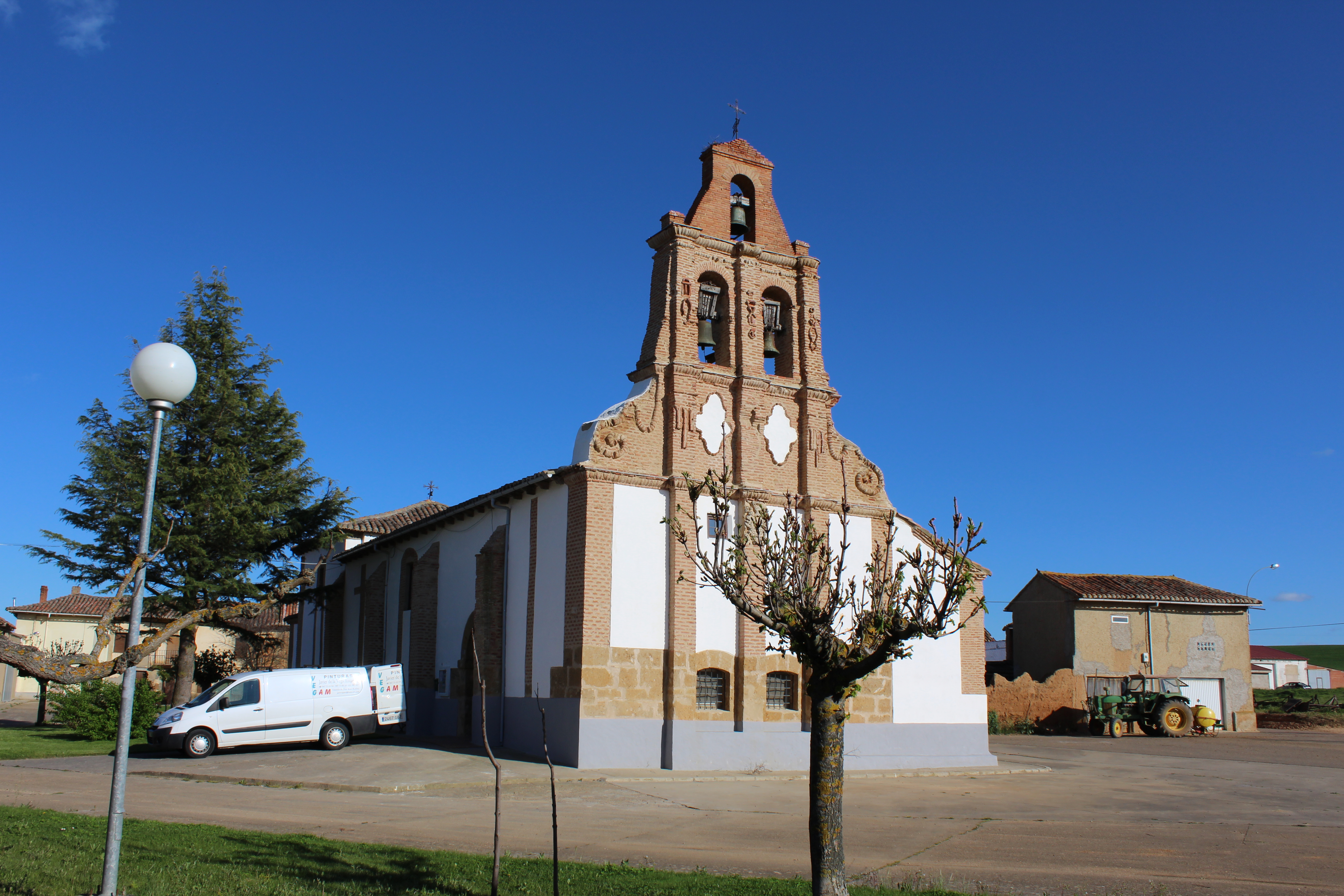 Iglesia parroquial de Pajares de los Oteros